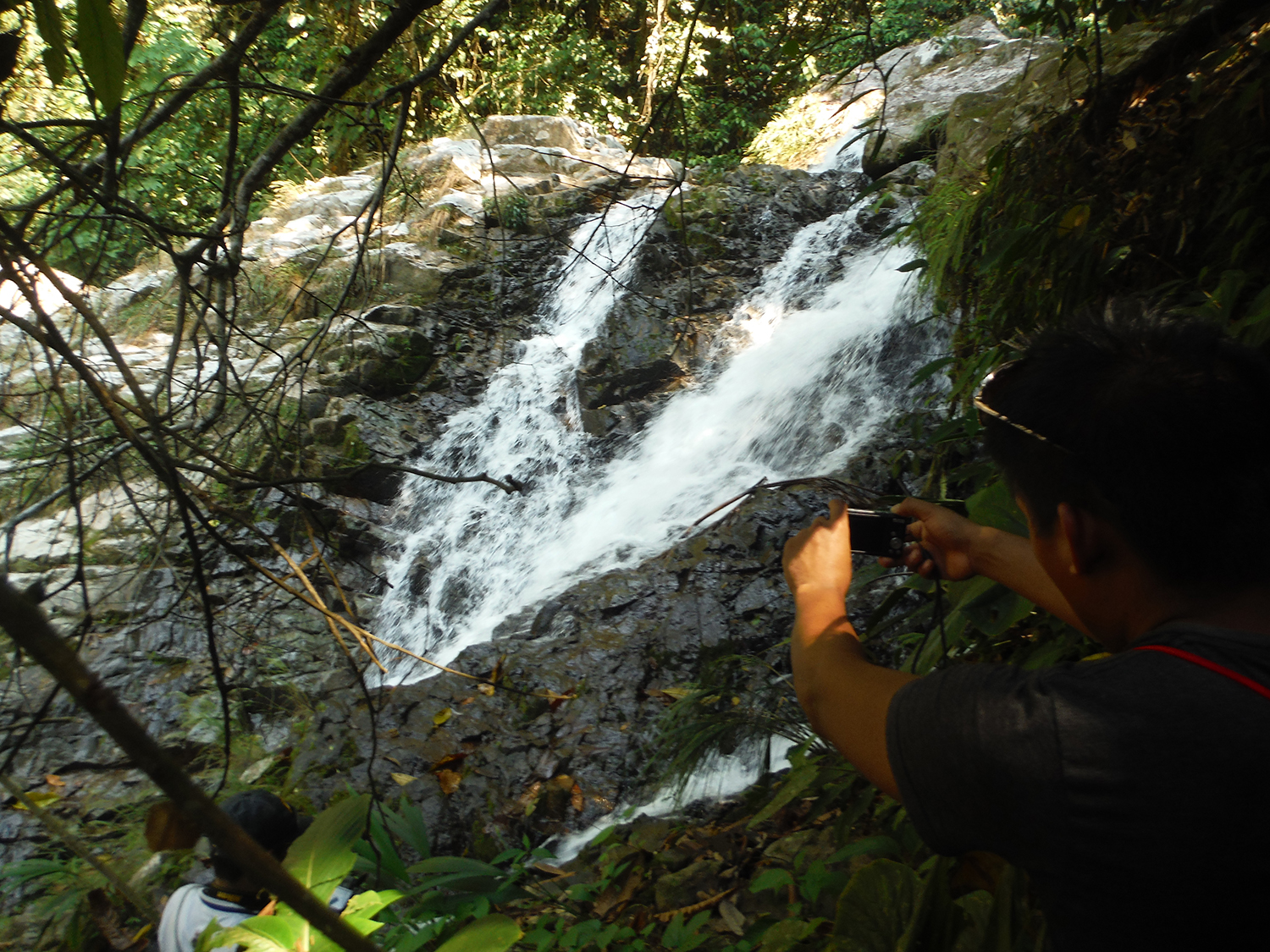 Cascada en la ruta a Cotomono